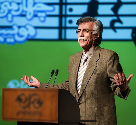 جاوید مجلسی در چهارمین سال نوای موسیقی ایران ۲ آذر ۱۳۹۷ فرهنگسرای نیاوران